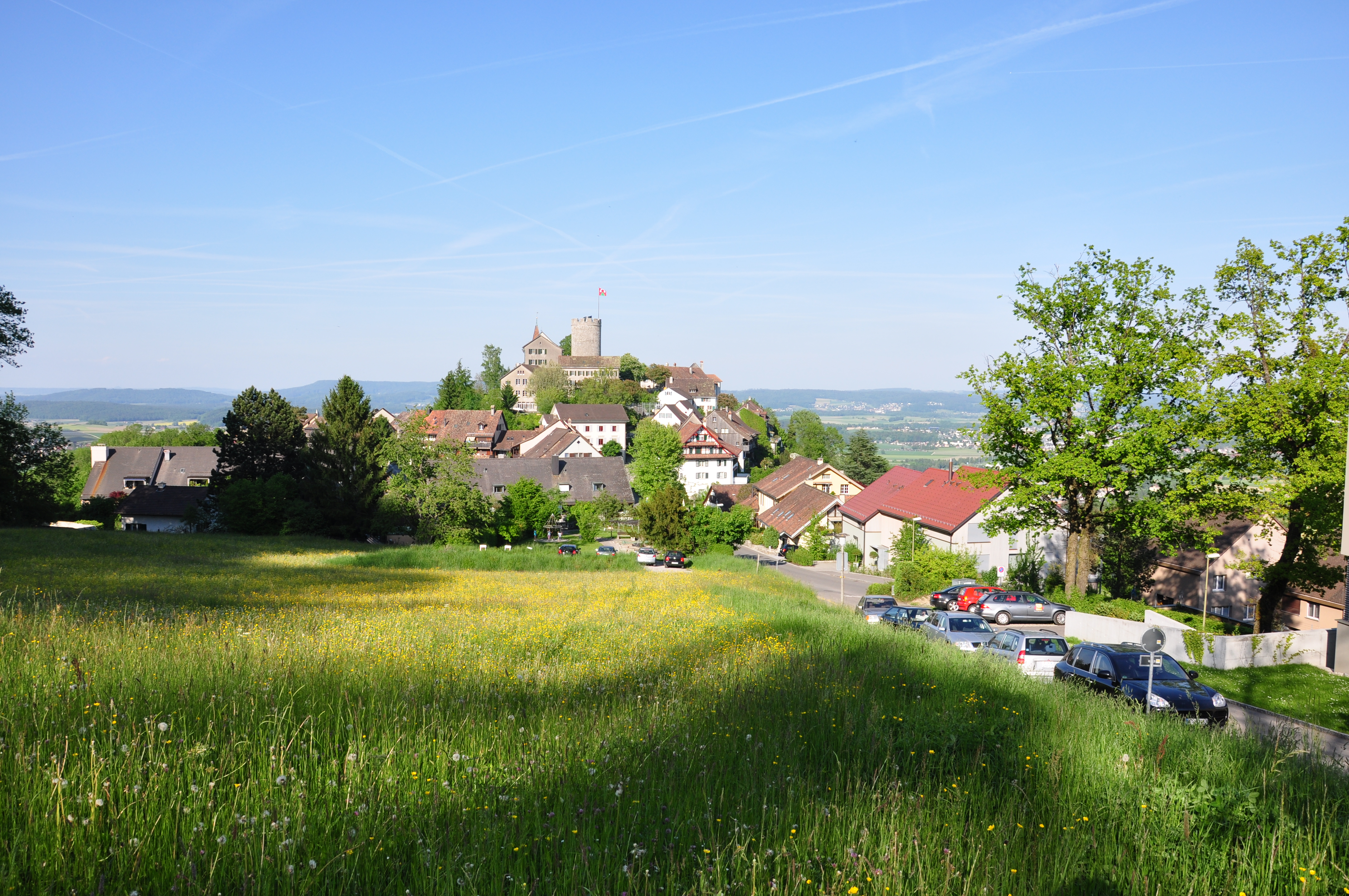 Regensberg as seen from Lägern (Switzerland)